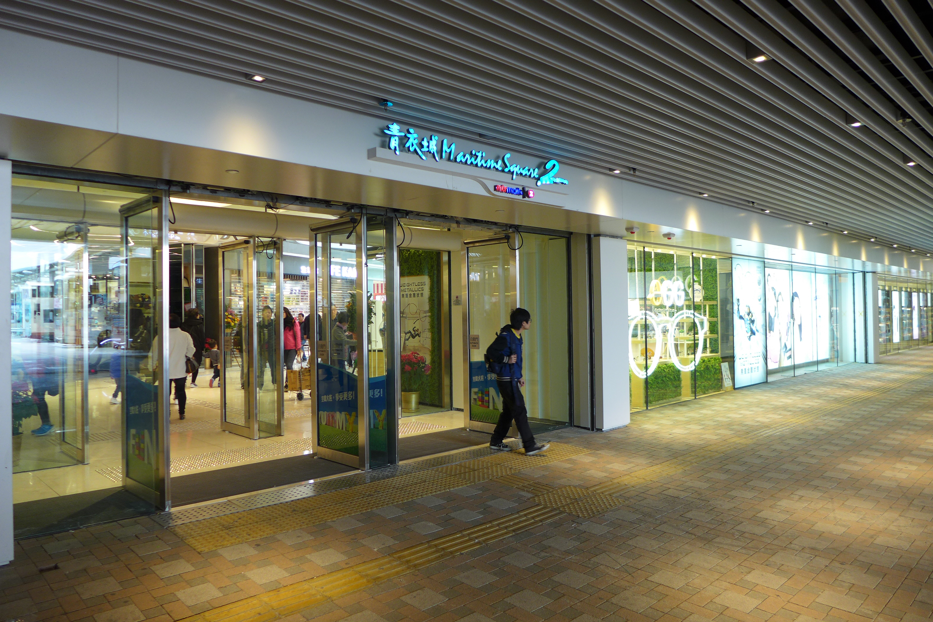 Maritime Square 2 L1 Entrance